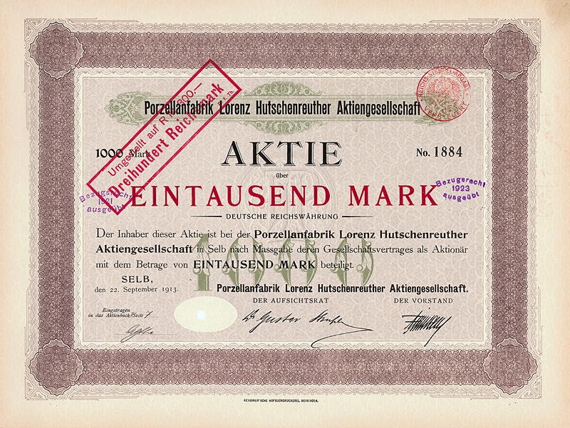 Aktie über 1000 Mark der Porzellanfabrik Lorenz Hutschenreuther AG vom 22. September 1913